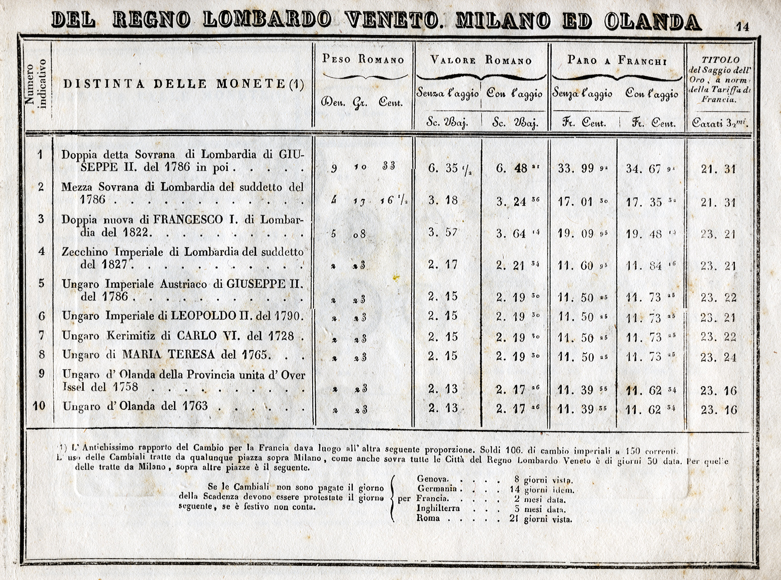 Tariffa Universale Figurata delle Monete Antiche, e Moderne D'oro, e d' Argento. Con il loro relativo peso e valuta, come sono ricevute in Commercio. Raccolta Dall'Incisore Stanisloa Morelli, e compagno. Fascicolo IV. Roma 1833, Tipografia Giunchi e Menicanti. Seite/Page 14.